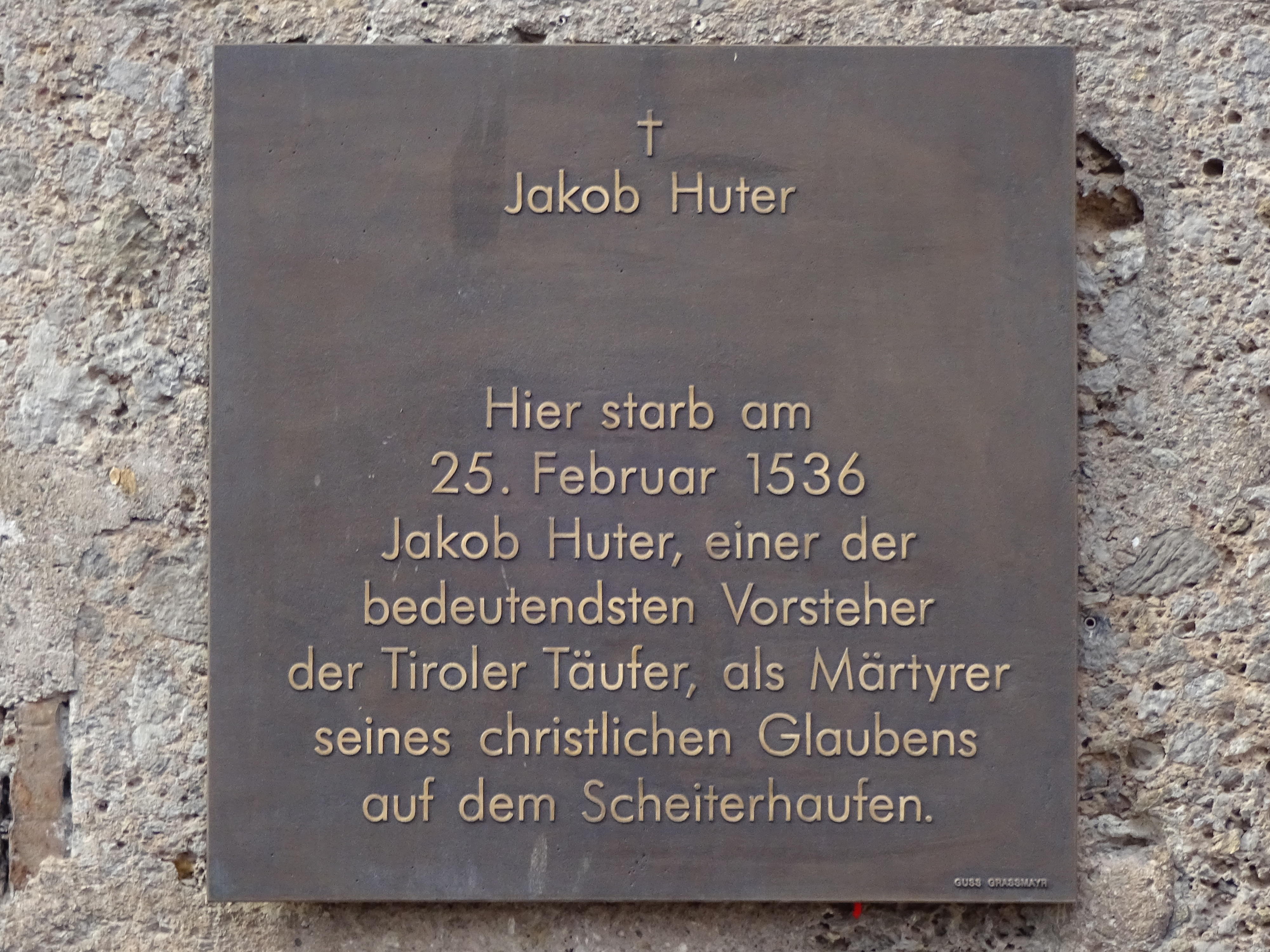 Gedenktafel für Jakob Huter am Neuen Hof/Goldenen Dachl in Innsbruck